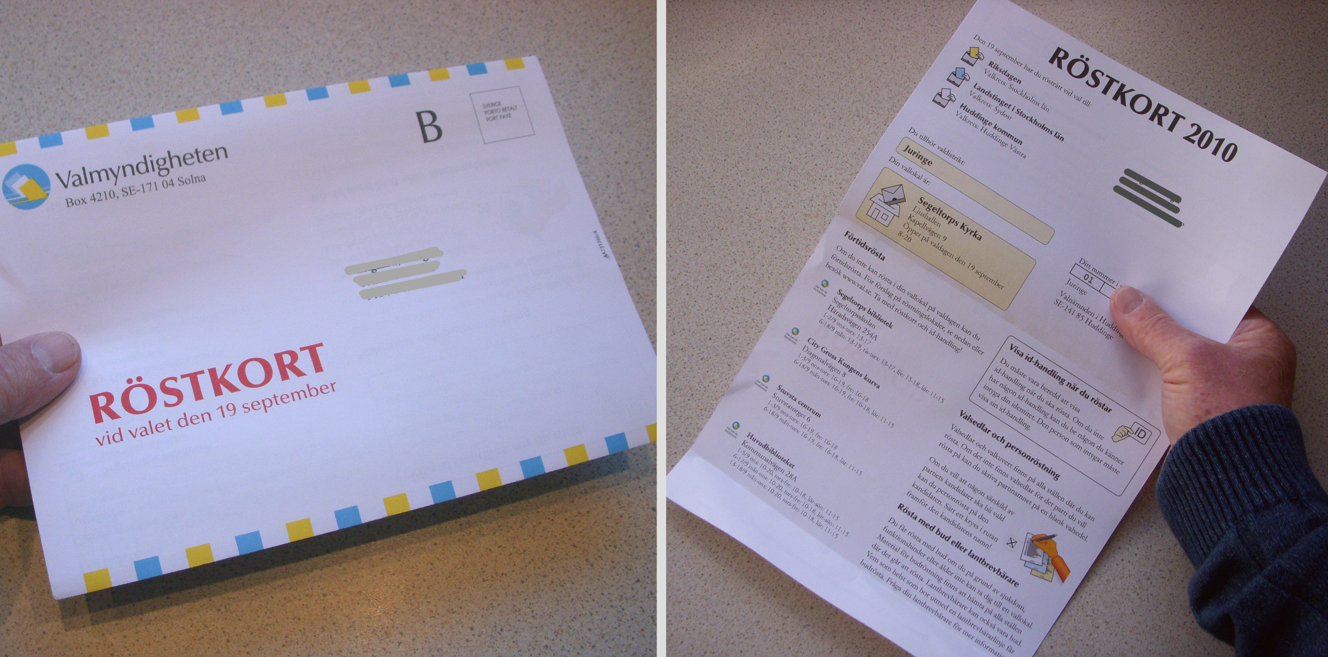 Röstkort för allmänna val i Sverige den 19 september 2010